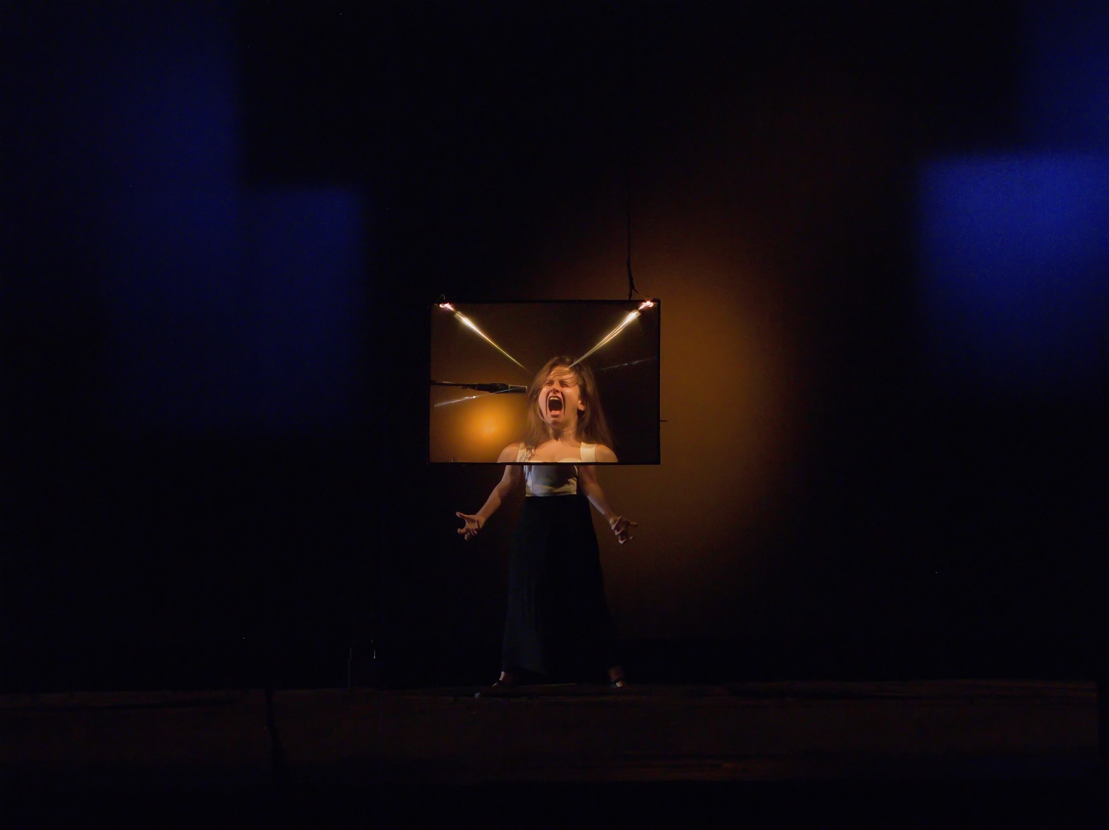 South - North, Fanny & Alexander (2009)